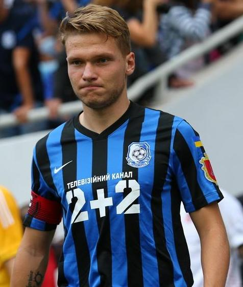 Артем Філімонов - футболіст Чорноморця (Одеса)